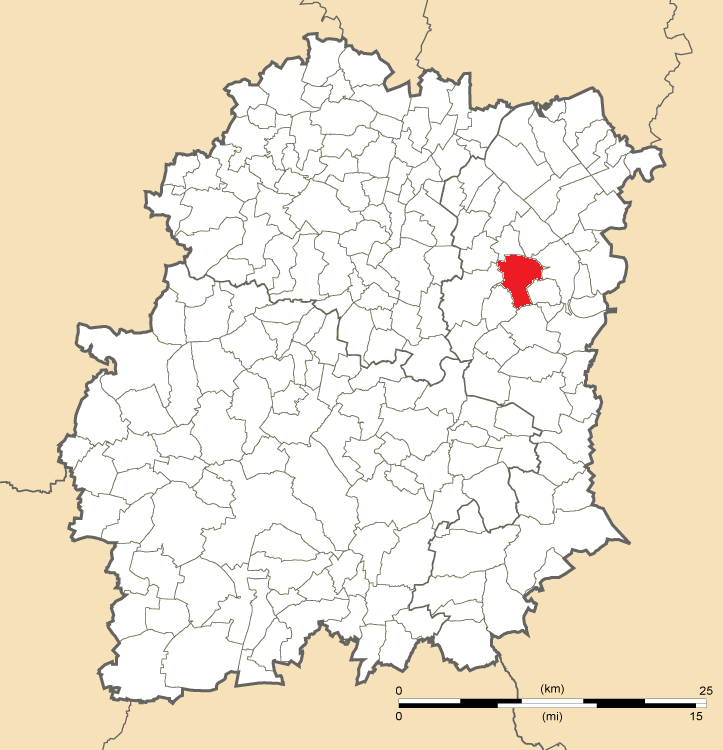 Carte de position de Lisses en Essonne (91)